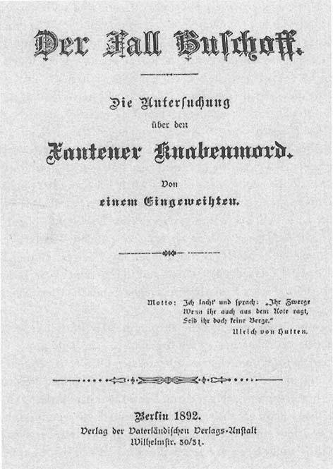 Ritualmordschrift zum "Fall Buschoff"